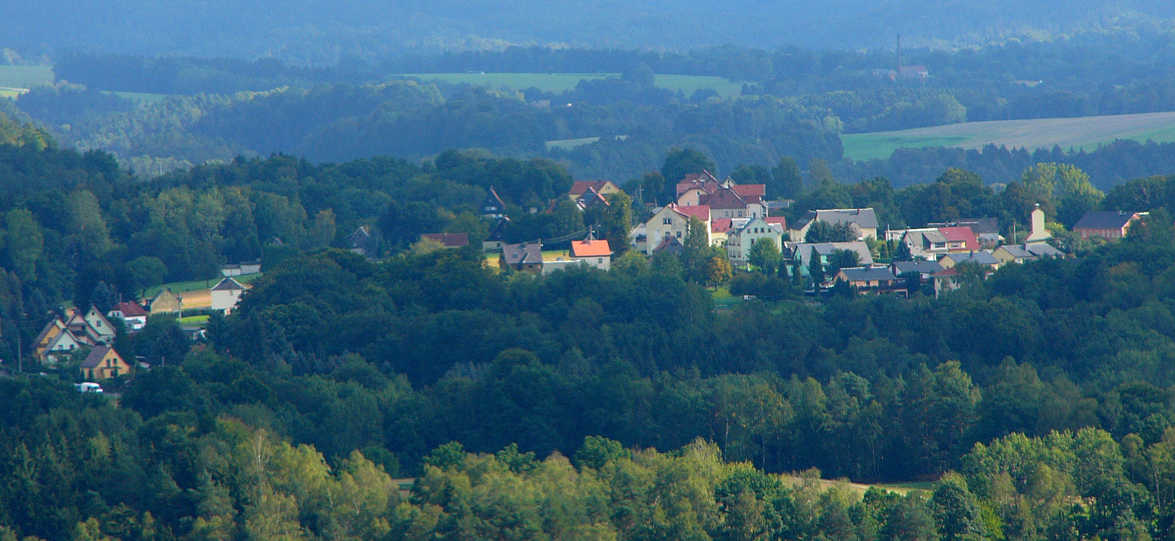 Waltersdorf, Ortsteil von Bad Schandau; vom Basteiweg / Malerweg aus gesehen